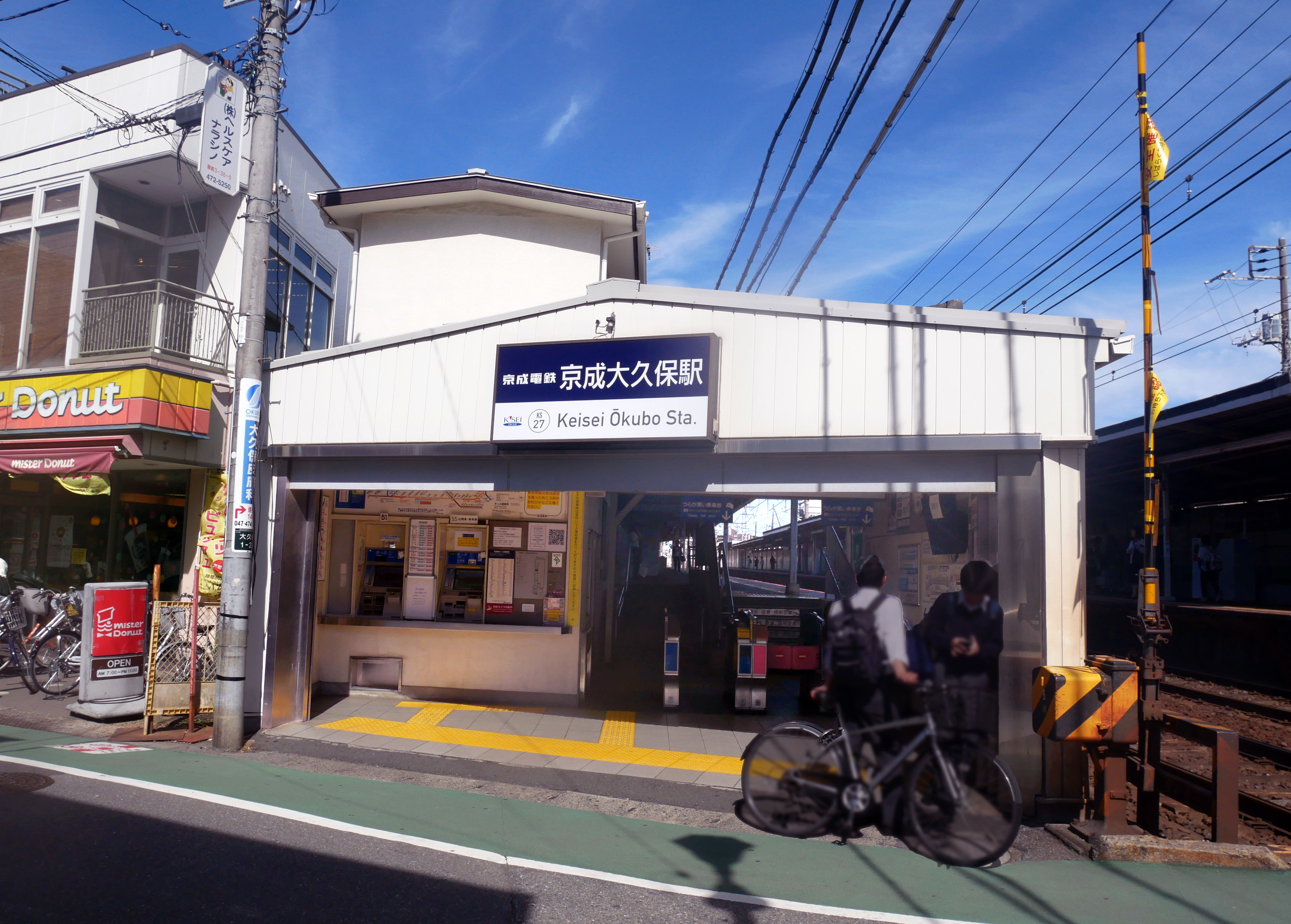 京成大久保駅 (Keisei-Ōkubo Station)